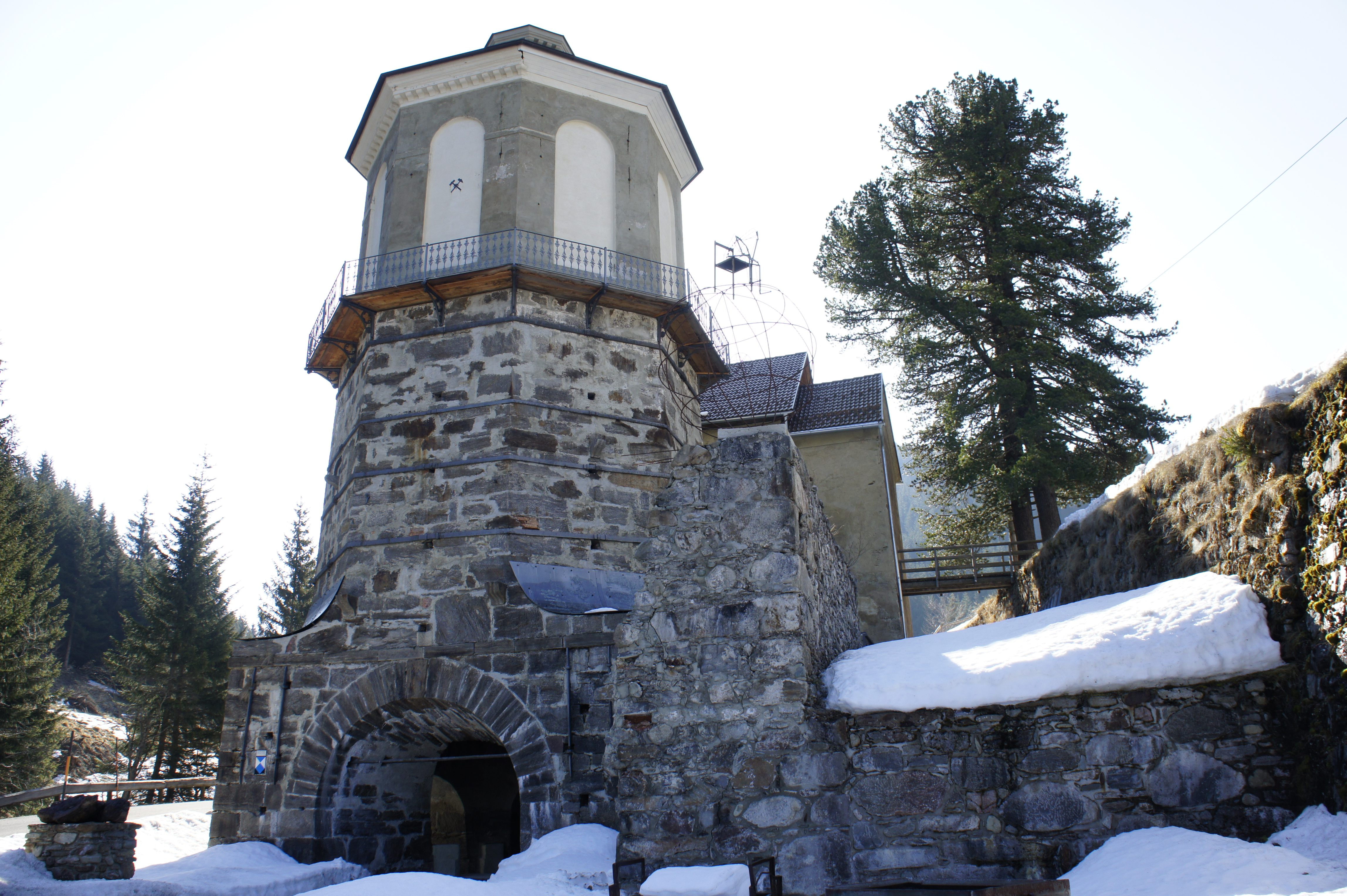 Hochofen